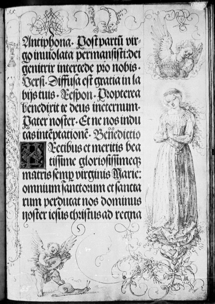 Bayerische Staatsbibliothek, Gebetbuch Kaiser Maximilians, fol. 51r., Randzeichnungen von Albrecht Dürer (Maria im Ährenkleid, von einem Engel gekrönt; musizierender Putto)